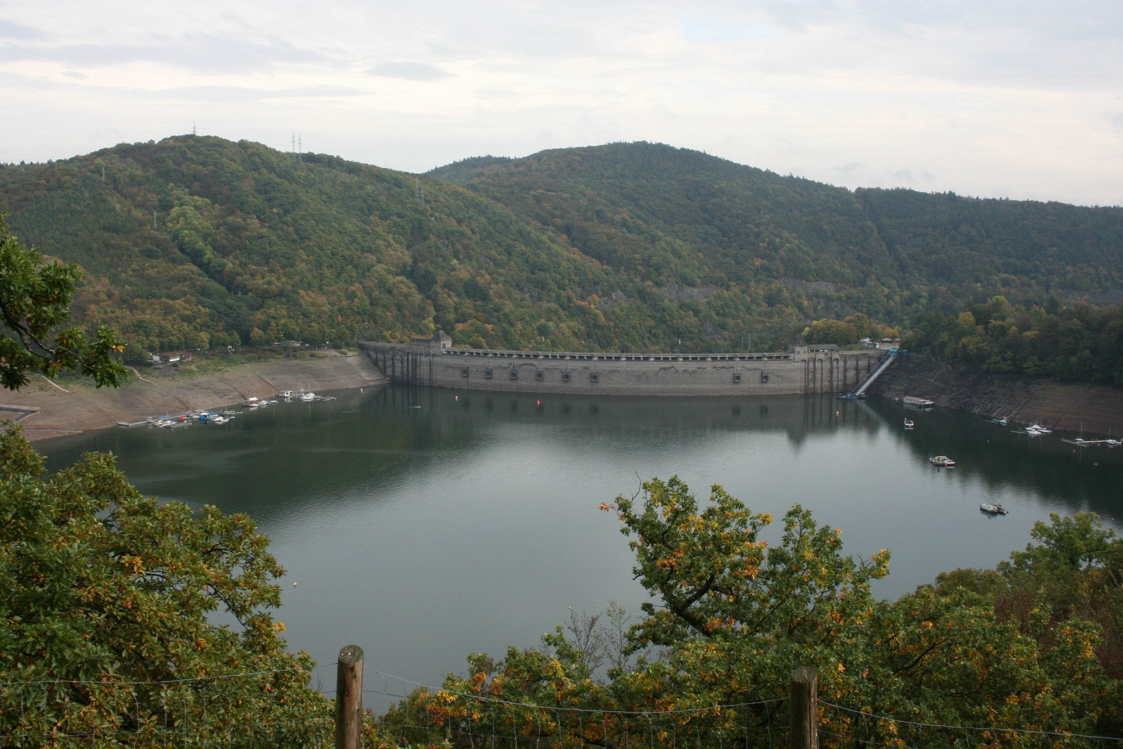 Die Staumauer am Edersee, Blick vom Wildpark aus